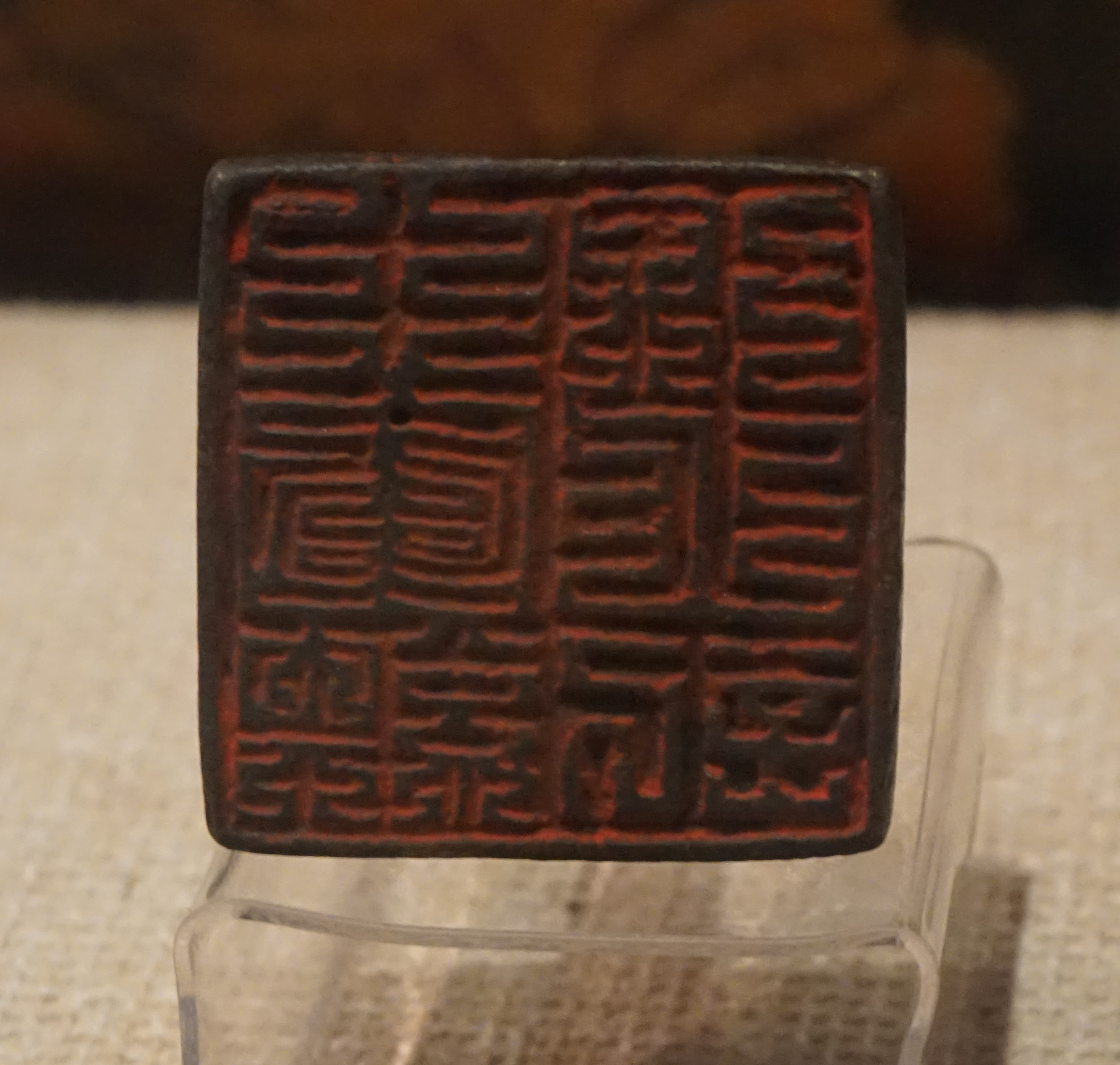 金“行军统领之印”铜印，北林区征集，二级文物